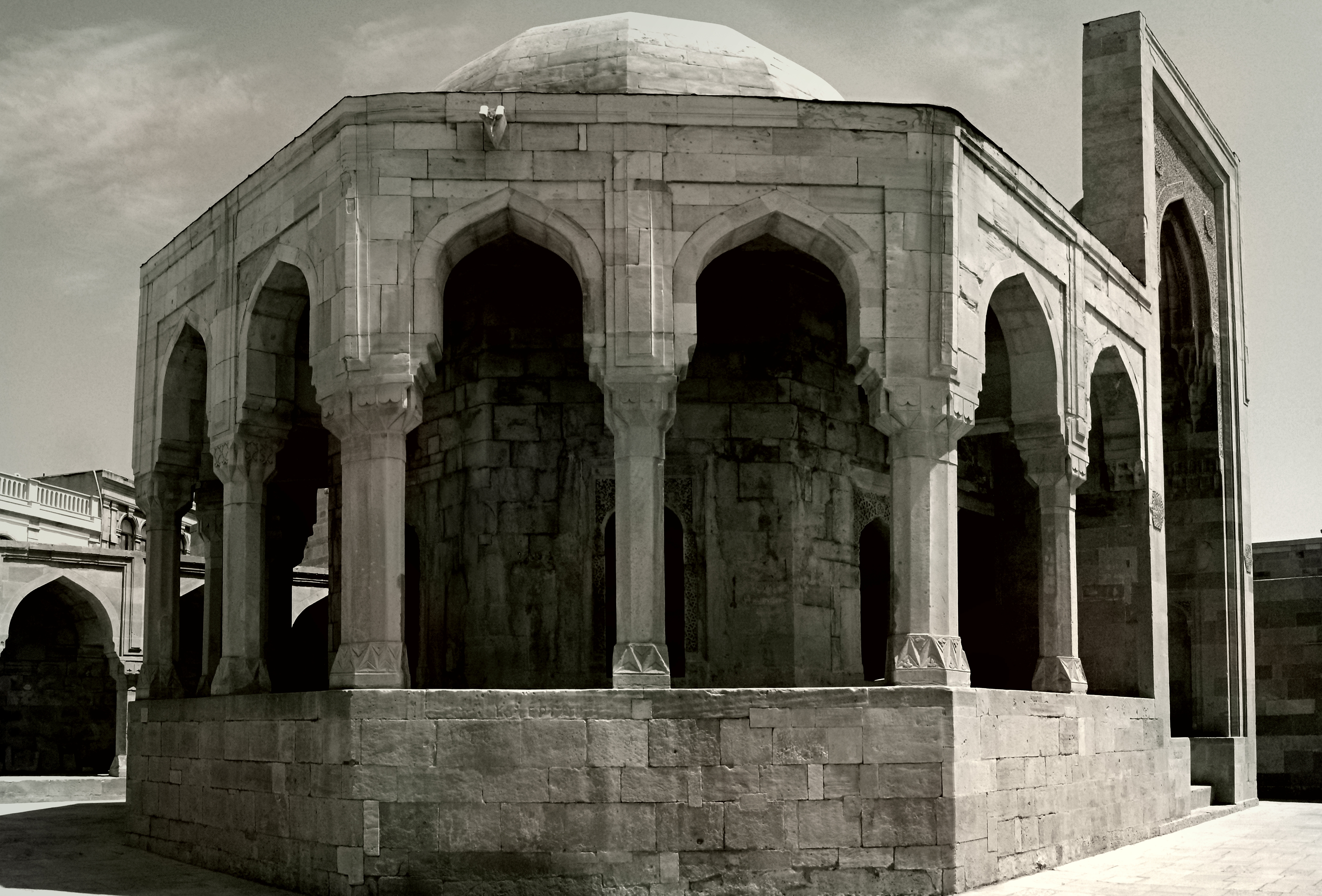 диванхана